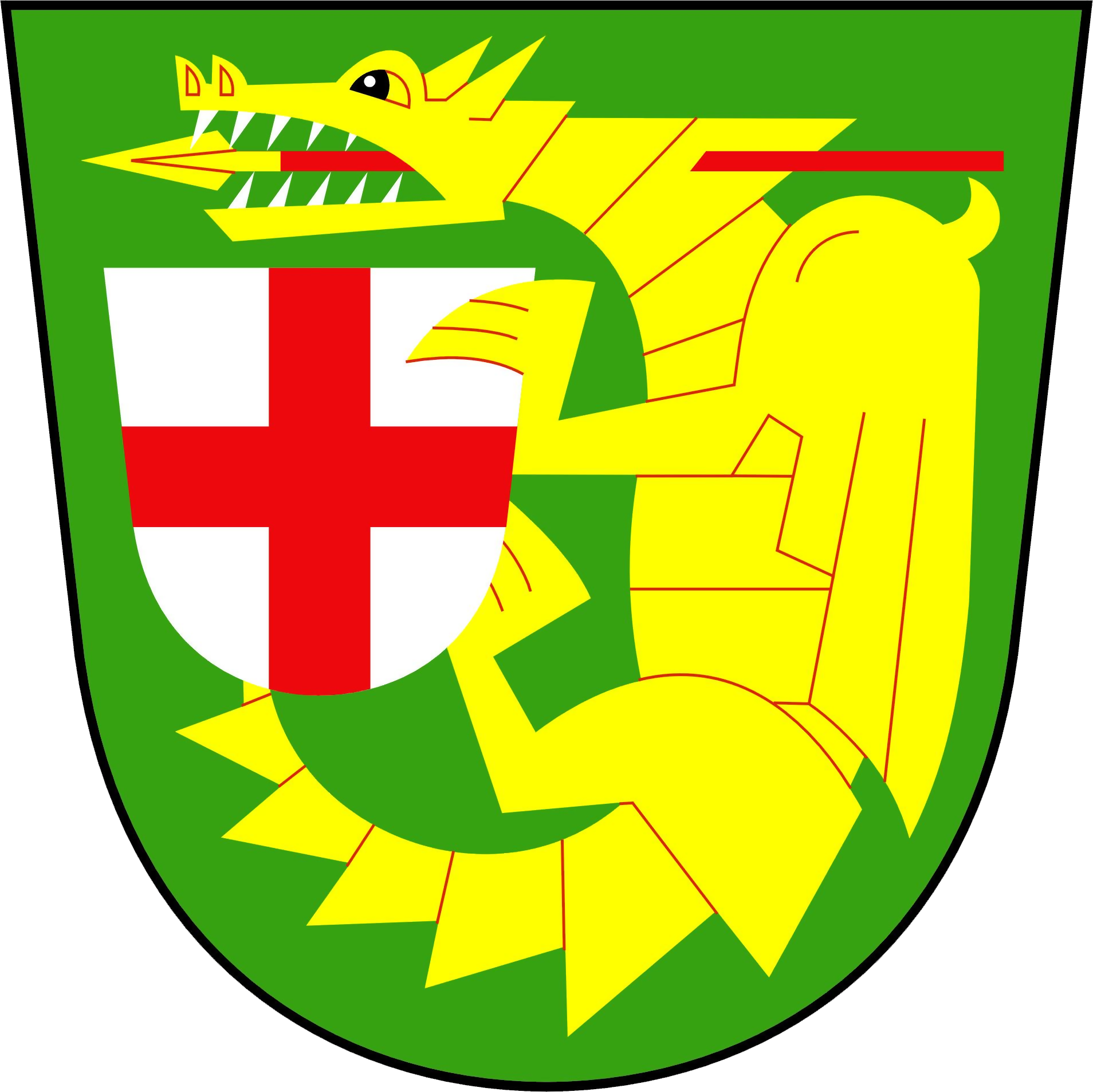 Znak obce Bělotín